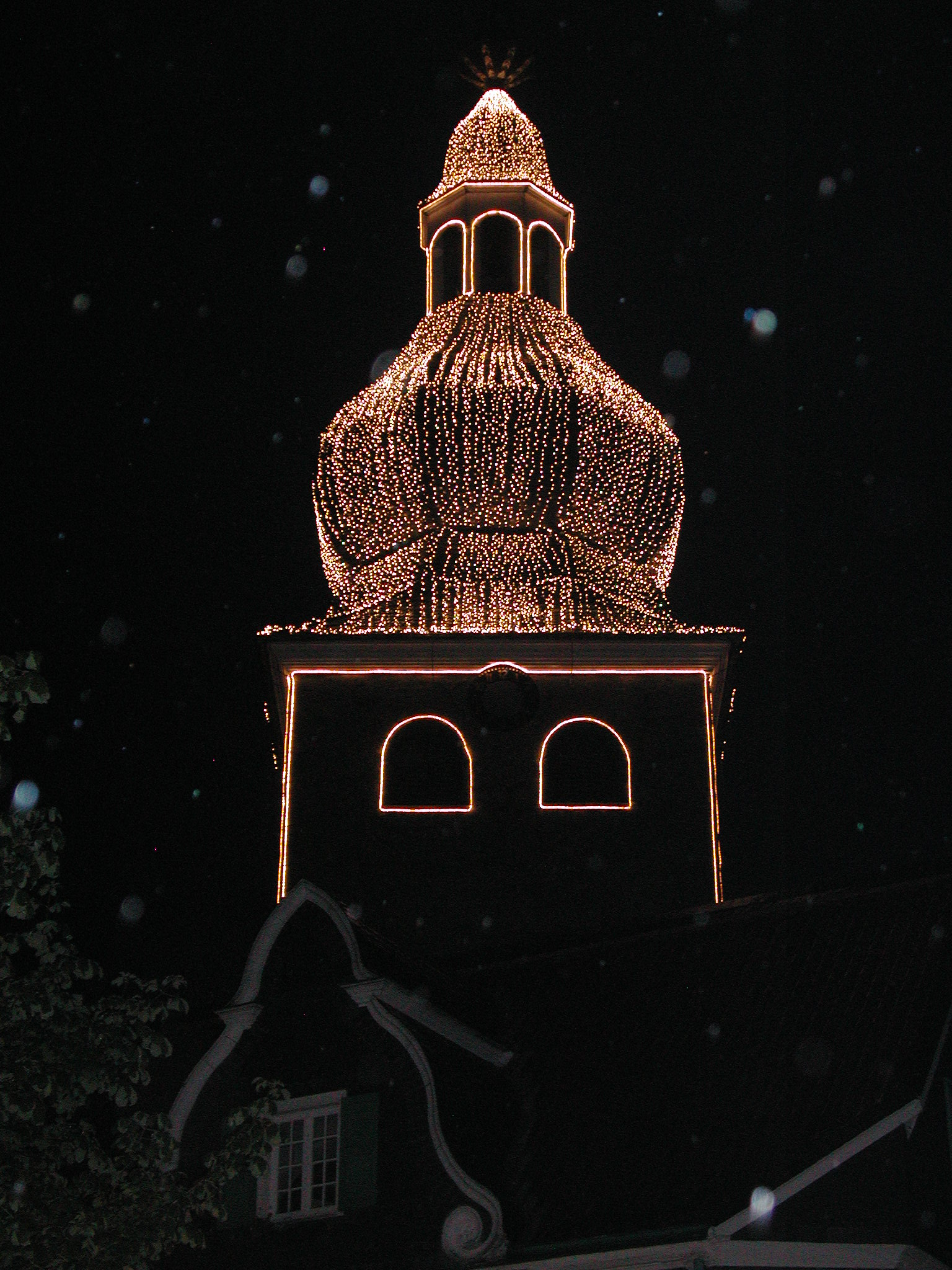 = Ev. Stadtkirche Lennep - Abendbeleuchtung Urheber = Fotograf: Hans Kadereit --ka Andere Versionen = keine Anmerkungen Aufgenommen mit Olympus SP800UZ Genehmigung